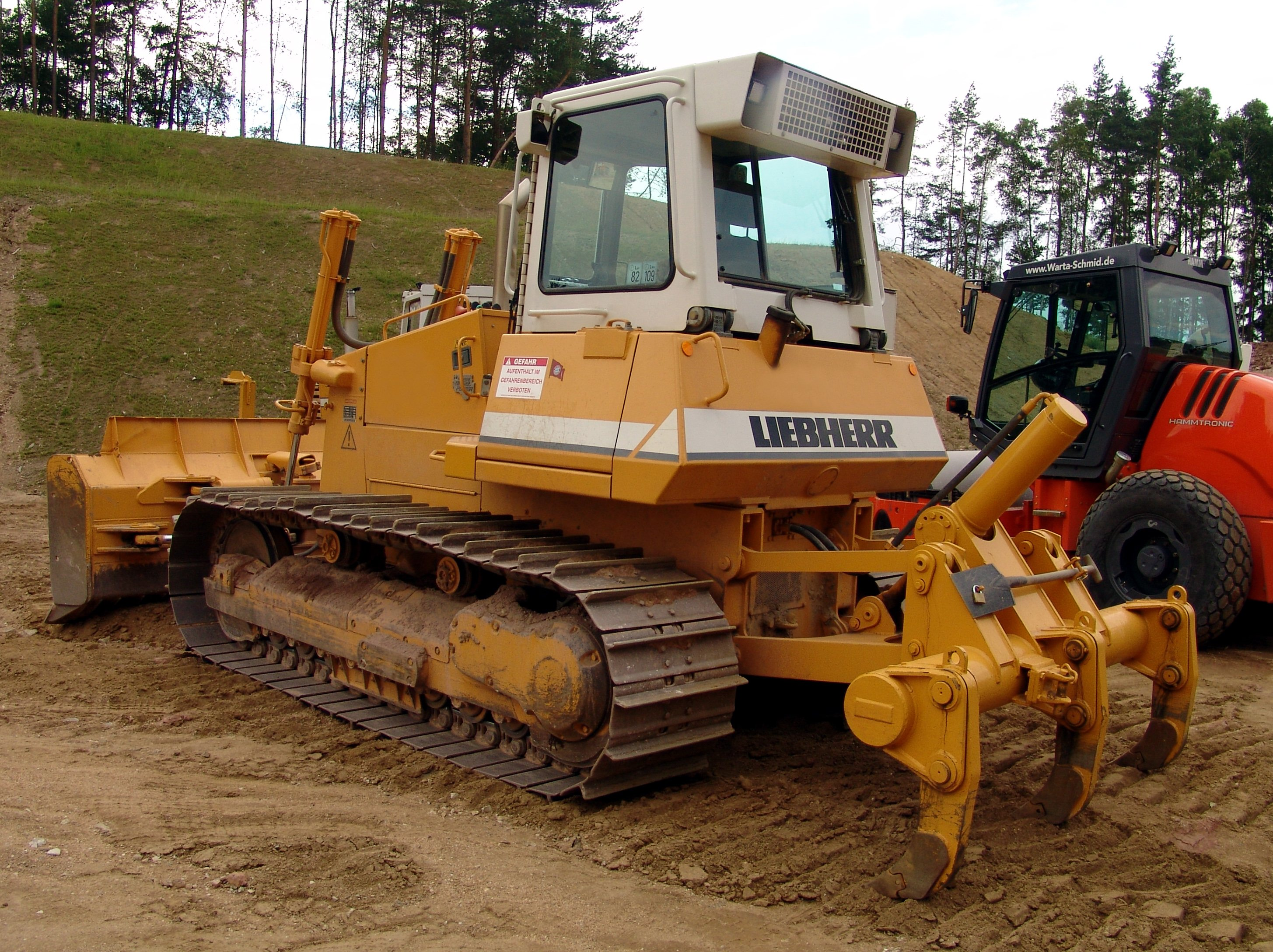 Liebherr 722 Planierraupe auf einem Teilstück (im Bau) der BAB 6 zwischen Amberg und dem Kreuz Oberpfälzer Wald